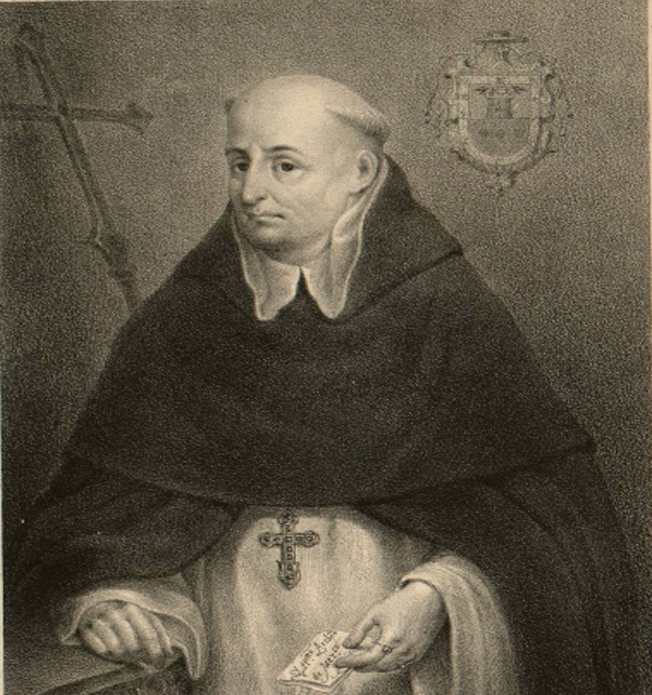 Fray Alonso de Montúfar O.P., II Arzobispo de México de 1551 a 1572